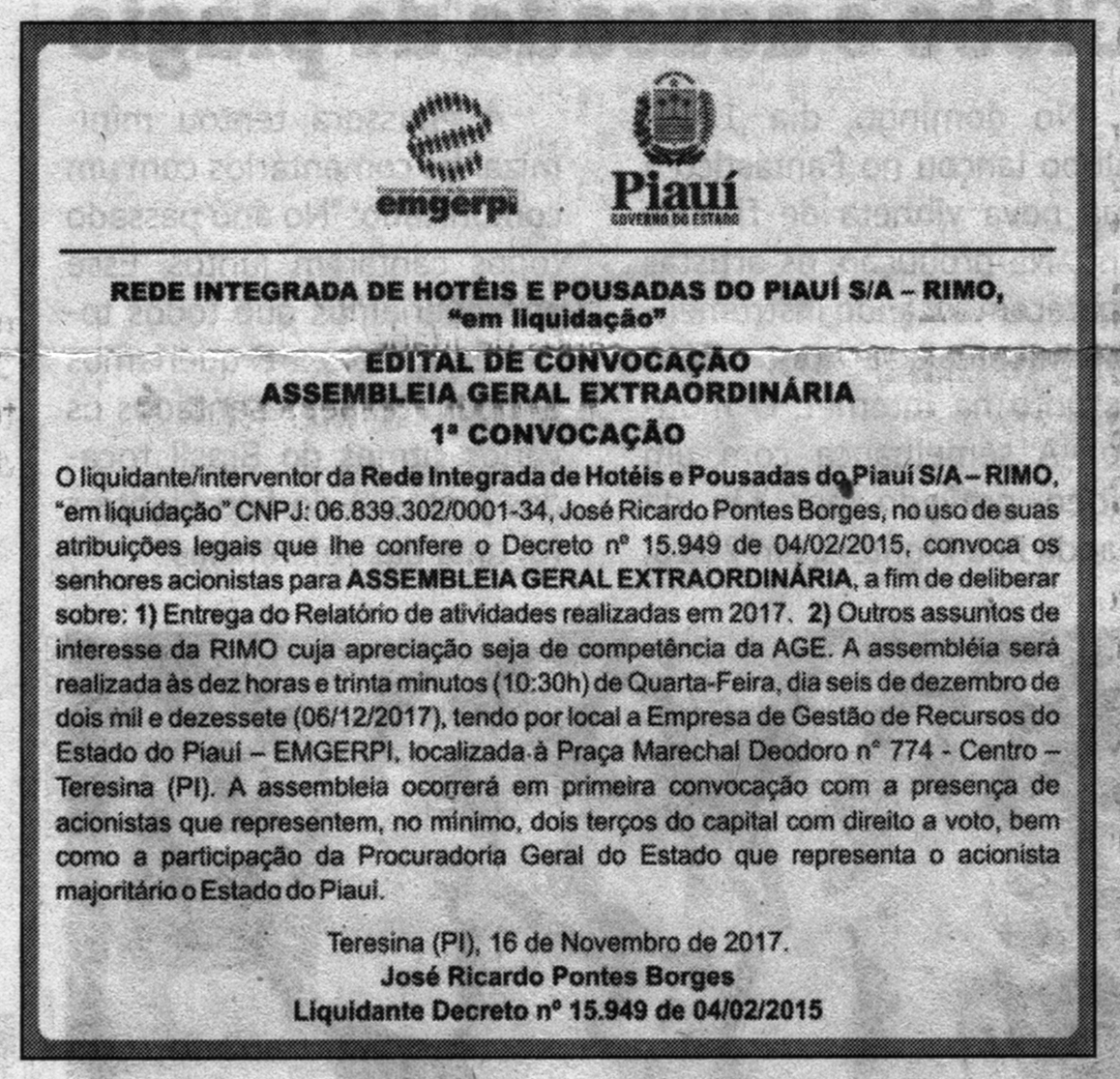 Edital de liquidação da Rede Integrada de Hotéis e Pousadas do Piauí S/A publicado na imprensa oficial do Estado e essa no jornal meio Norte do dia 21 de novembro de 2017.